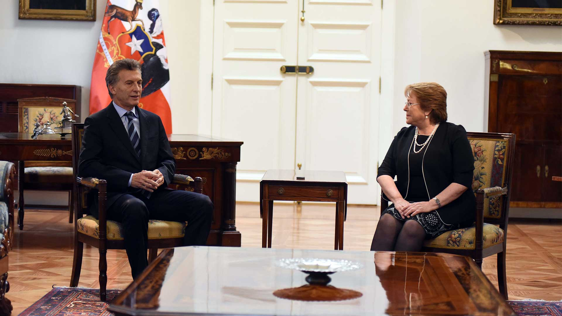 Reunión entre Mauricio Macri y Michelle Bachelet